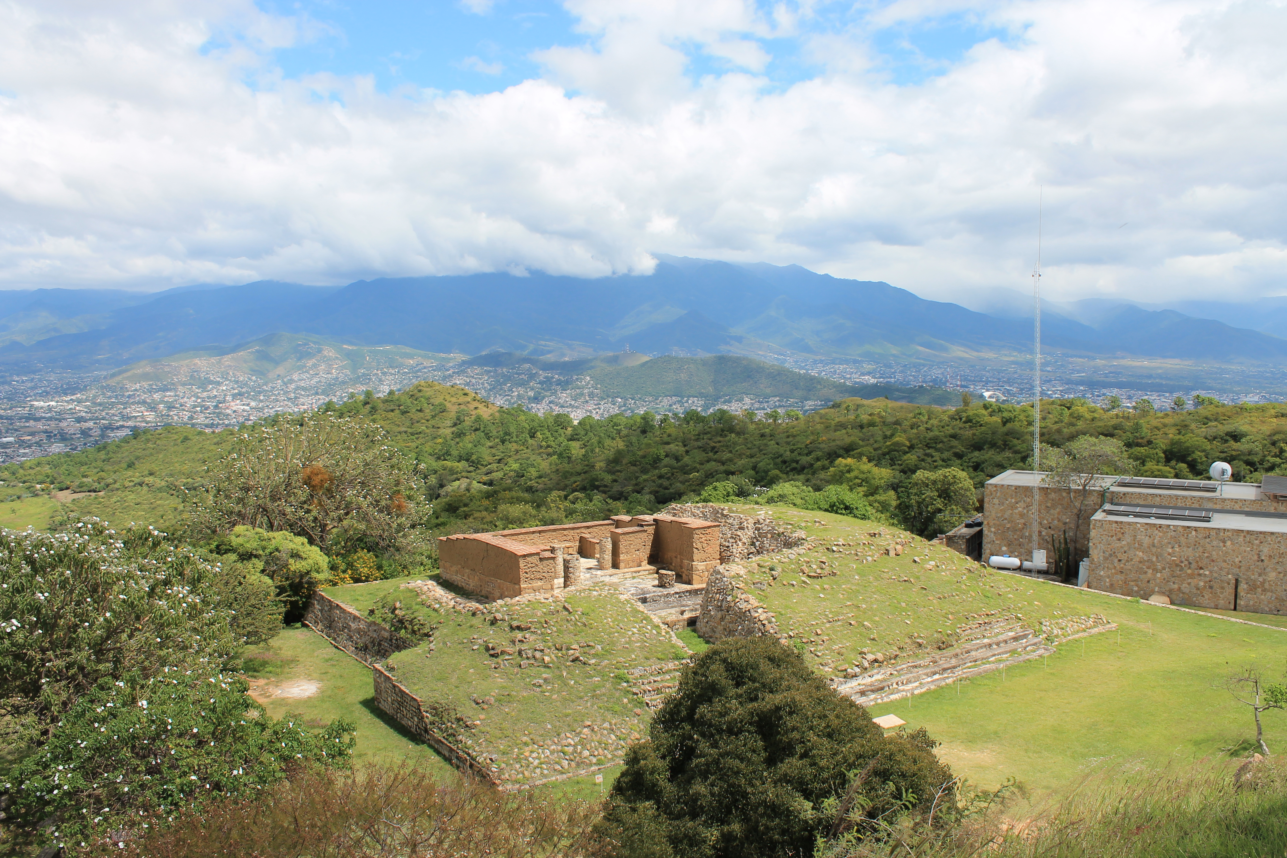 Vista del Edificio X, ubicado en la zona Noreste de Monte Albán, junto al Museo de Sitio (es la edificación que se divisa en el extremo derecho de la fotografía)..